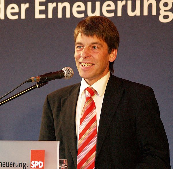 Dr. Albrecht Schröter